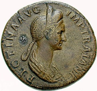 Portret van Plotina op een Romeinse sestertie.